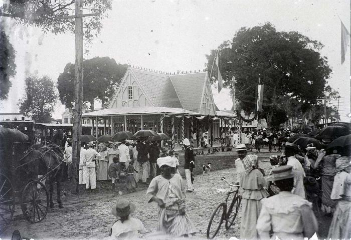 Negatief. Het station lag aan het Vaillantsplein in Paramaribo. De spoorlijn liep van Paramaribo tot Kabel. Tijdens de bestuursperiode van gouverneur Lely is het grootste deel van het traject gereedgekomen.. Mensenmenigte bij de opening van het spoor dat leidt naar de goudvelden in het binnenland